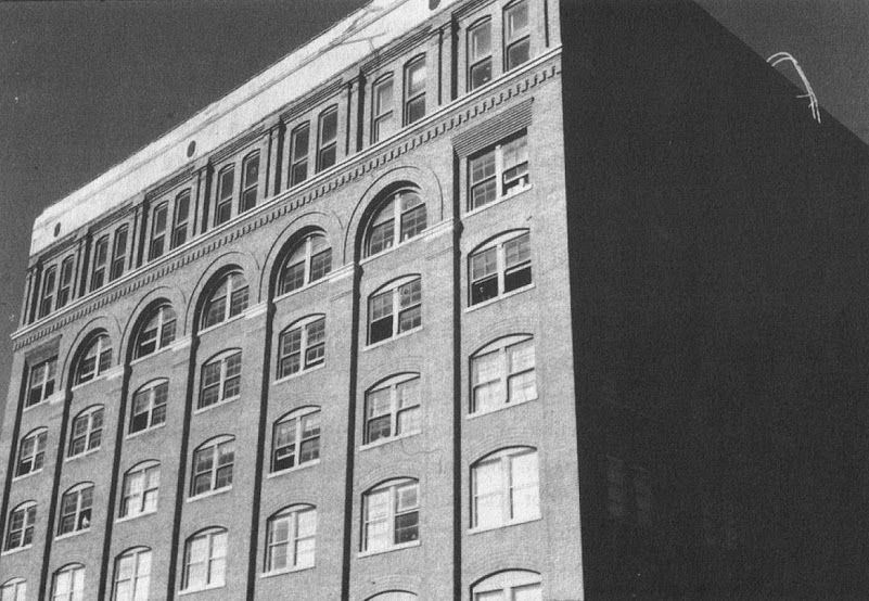 Foto del depósito de libros de Dealey segundos después de los disparos se puede ver una persona en la ventana